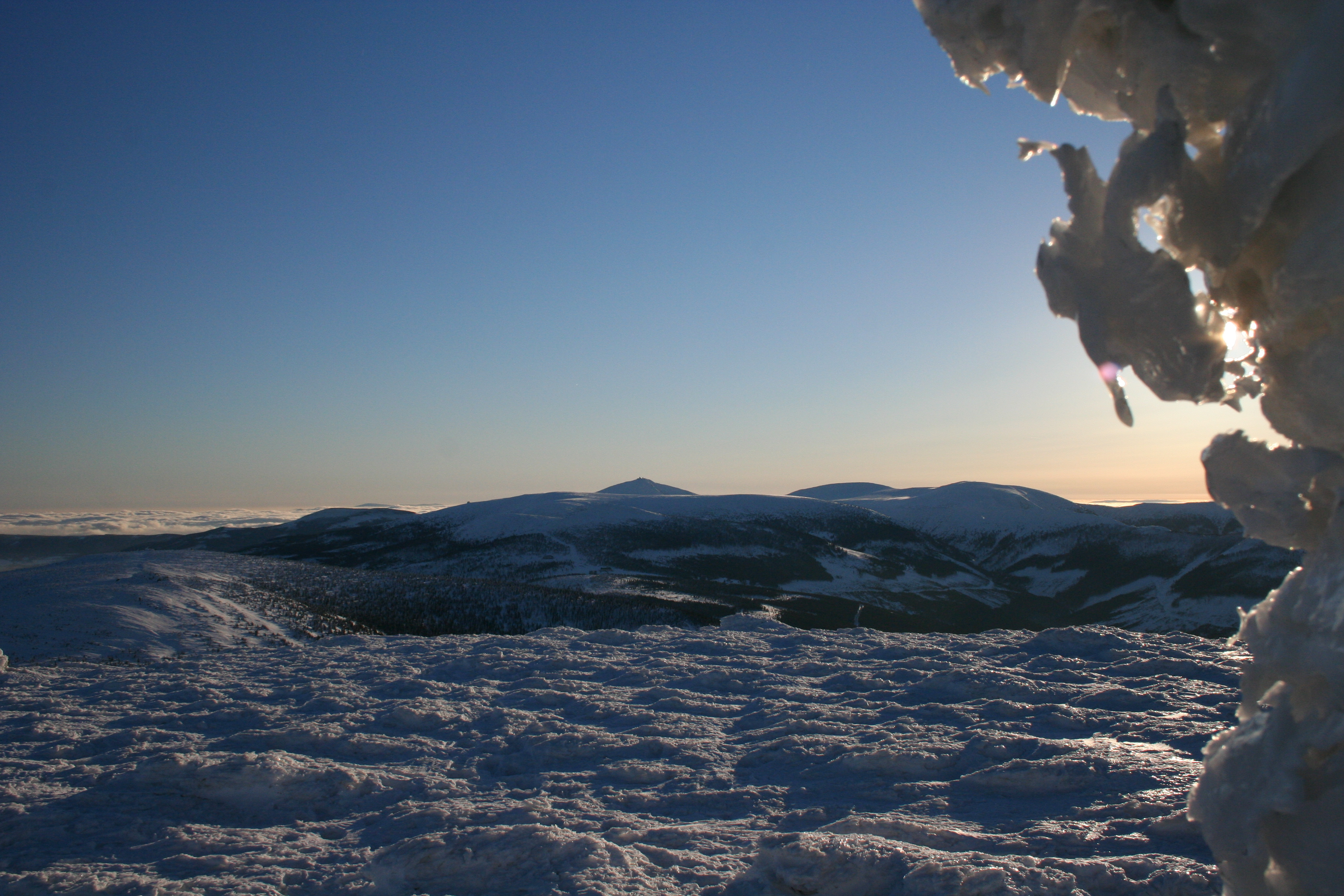 Śnieżka seen from Wielki Szyszak. Winter 2006.